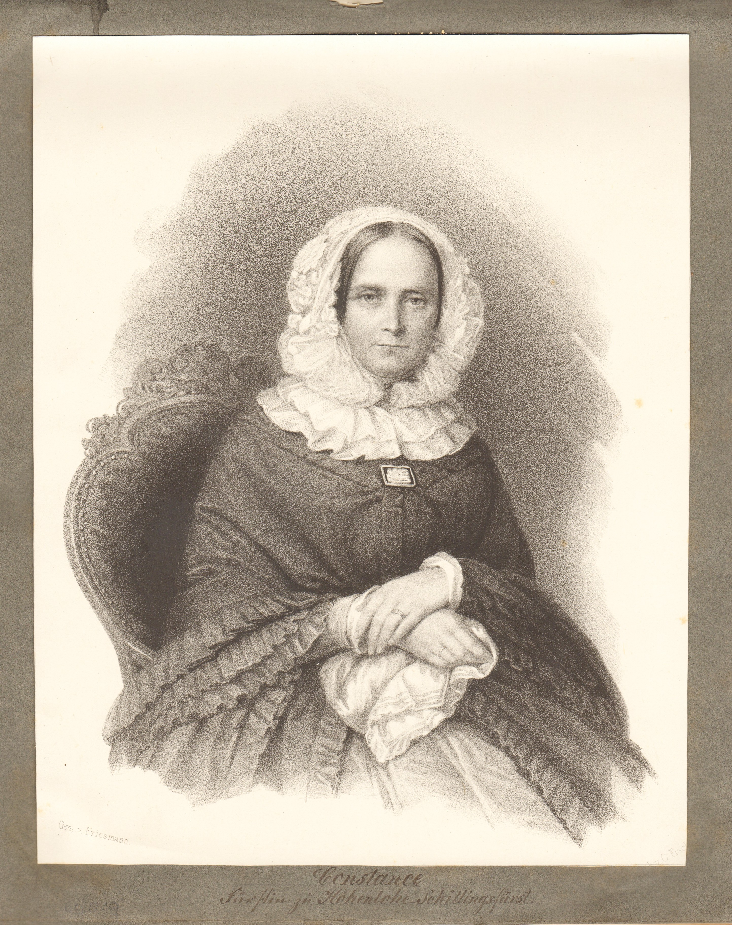 Prinzessin Konstanze zu Hohenlohe-Langenburg (1792...1847) war die Gemahlin des Fürsten Franz-Joseph zu Hohenlohe-Schillingsfürst (1787...1841) und die Mutter von Chlodwig Carl Viktor Fürst zu Hohenlohe-Schillingsfürst, Prinz von Ratibor und von Corvey (1819 - 1901). Beschnitten und auf altem Paier aufgezogen, insgesamt gut erhalten.